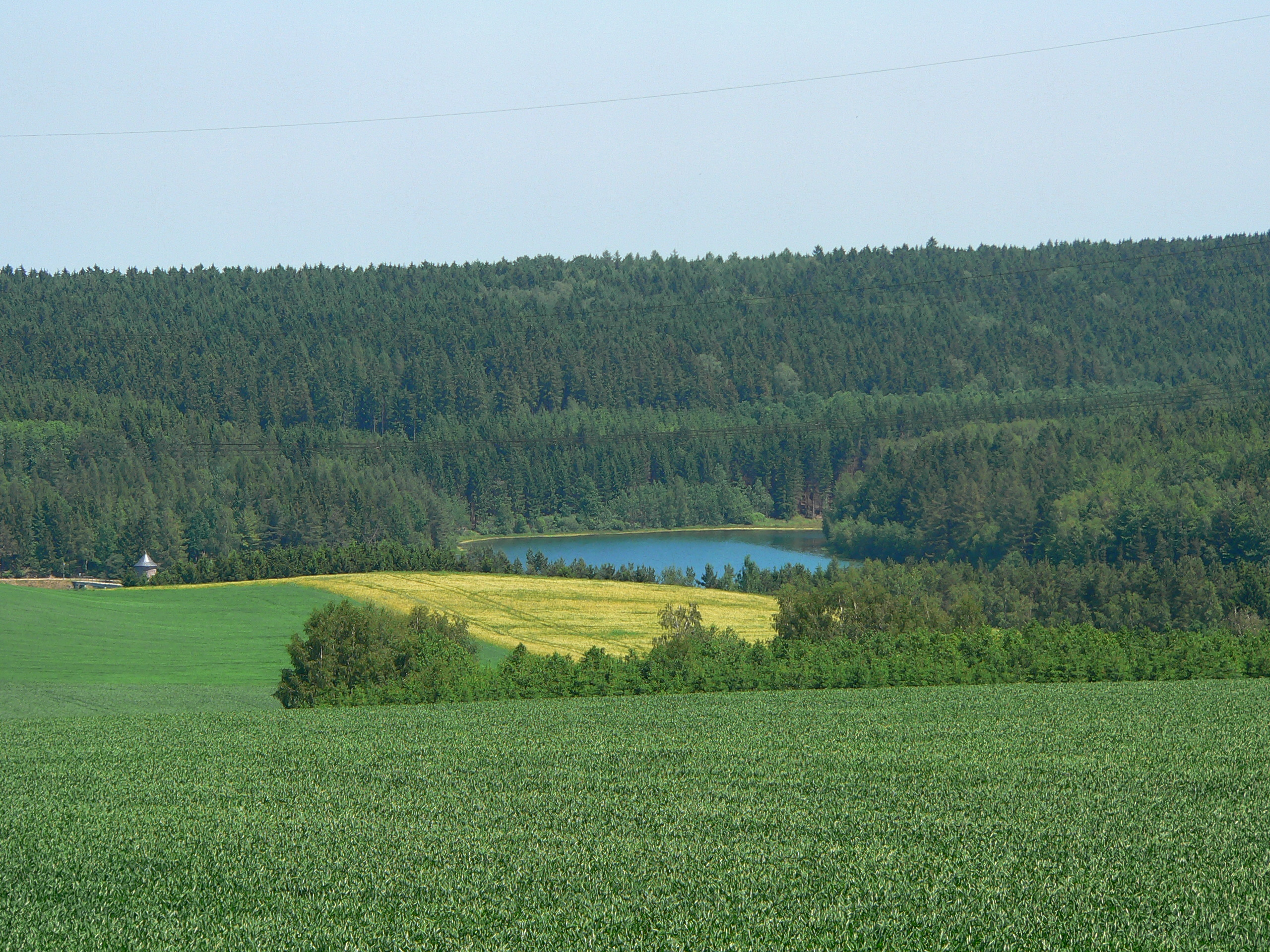 idyllisch gelegene Querenbachtalsperre am grünen Rand von Stollberg Richtung Thalheim als Trinkwasserreservoir genutzt.